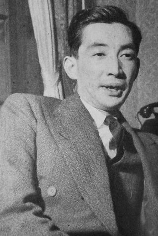 黒木従達（宮内庁東宮侍従長）